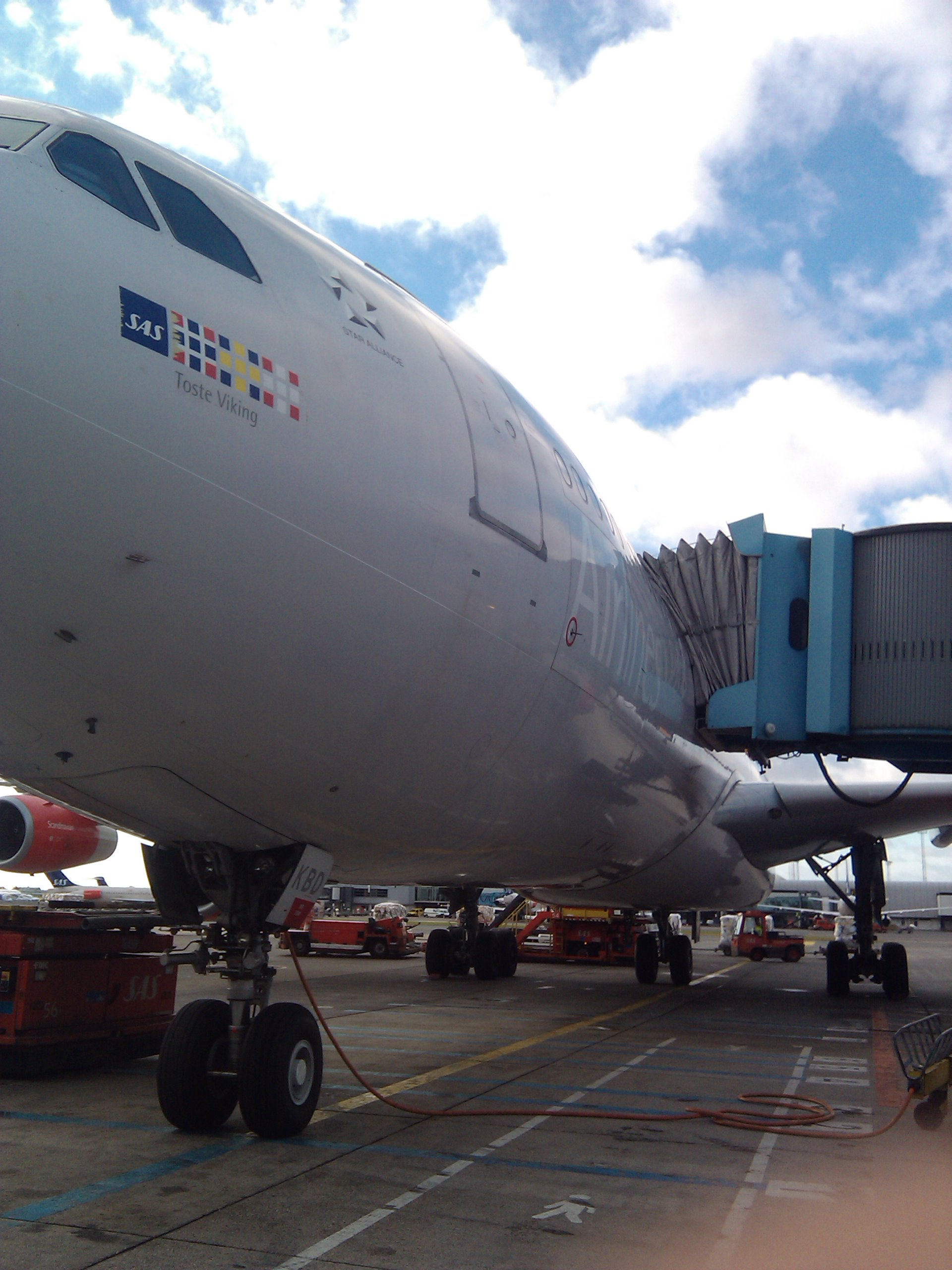 Toste Viking (OY-KBD) gået til gate i Københavns Lufthavn Kastrup.